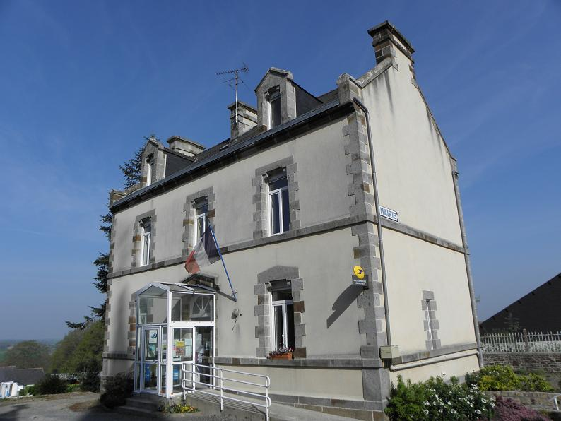 Mairie de Saint-Rémy-du-Plain (35).